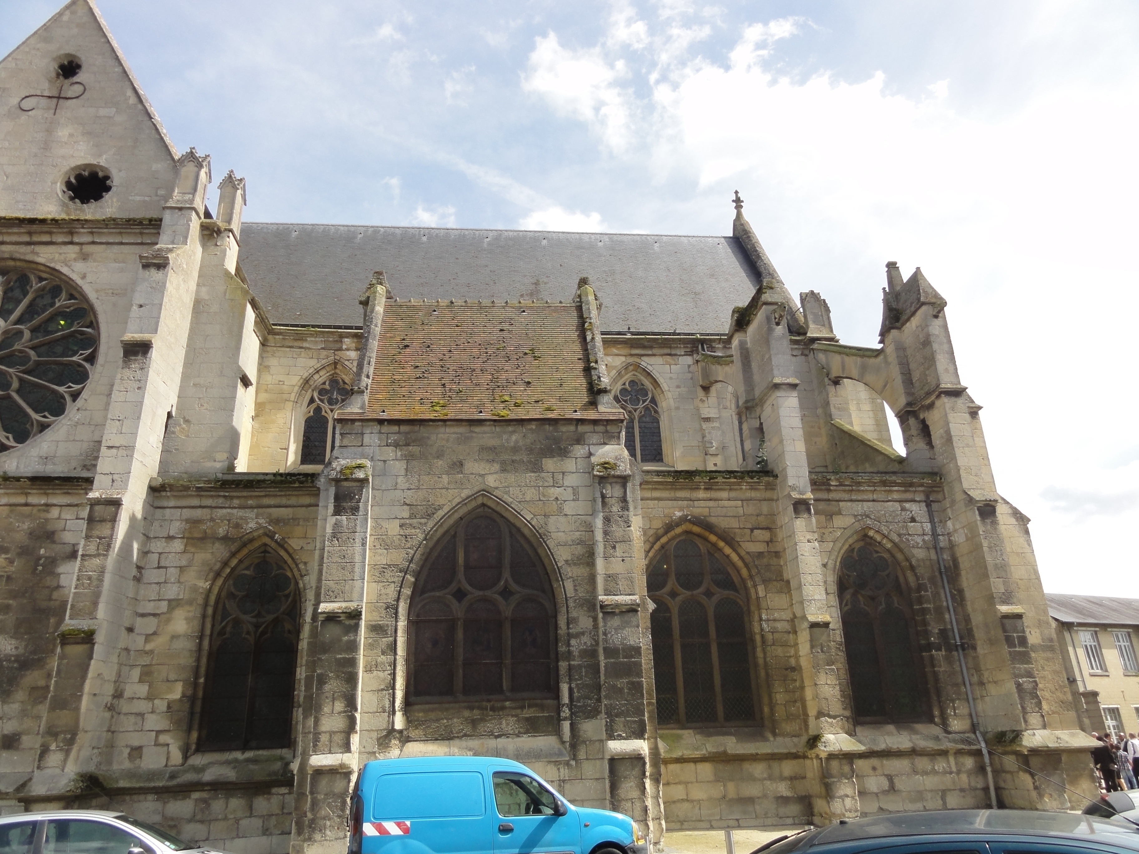 Église Notre-Dame de Chambly